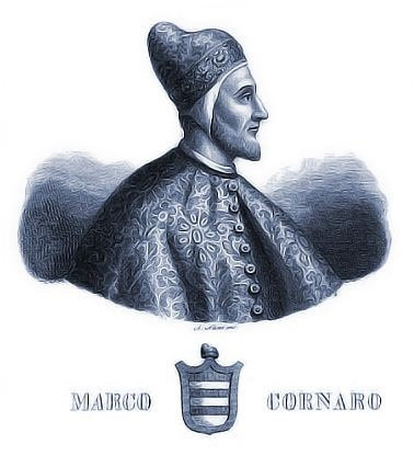 Портрет дожа Марко Корнаро